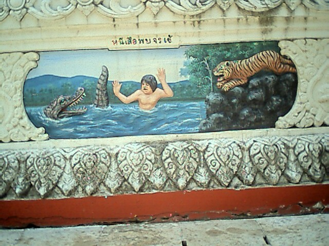 หนีเสือพบจะเข้ (หนีเสือปะจระเข้) -- Illustrated Proverb: Flee tiger for crocodile